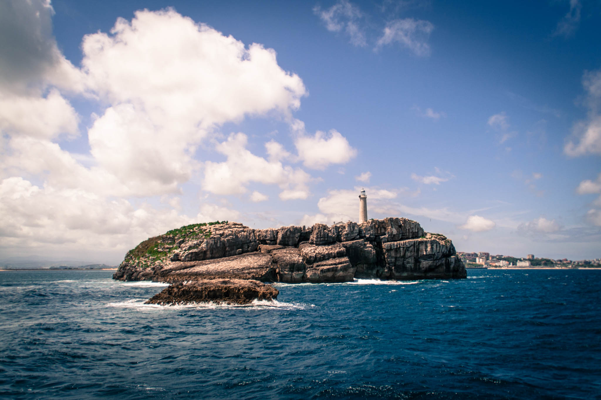 Isla de Mouro - Santander